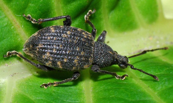 Gegroefde lapsnuitkever